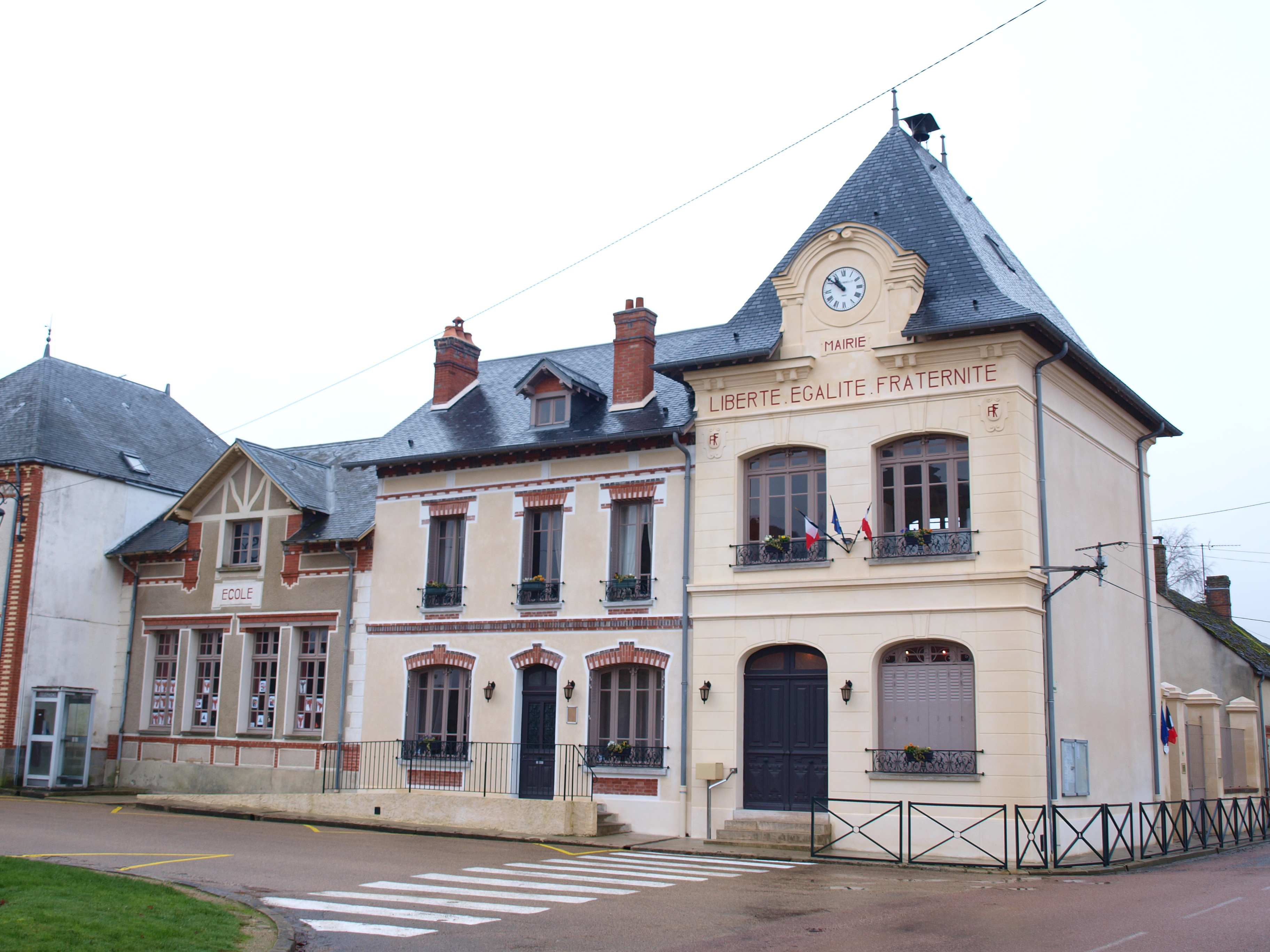 Chevrainvilliers (Seine-et-Marne; France)